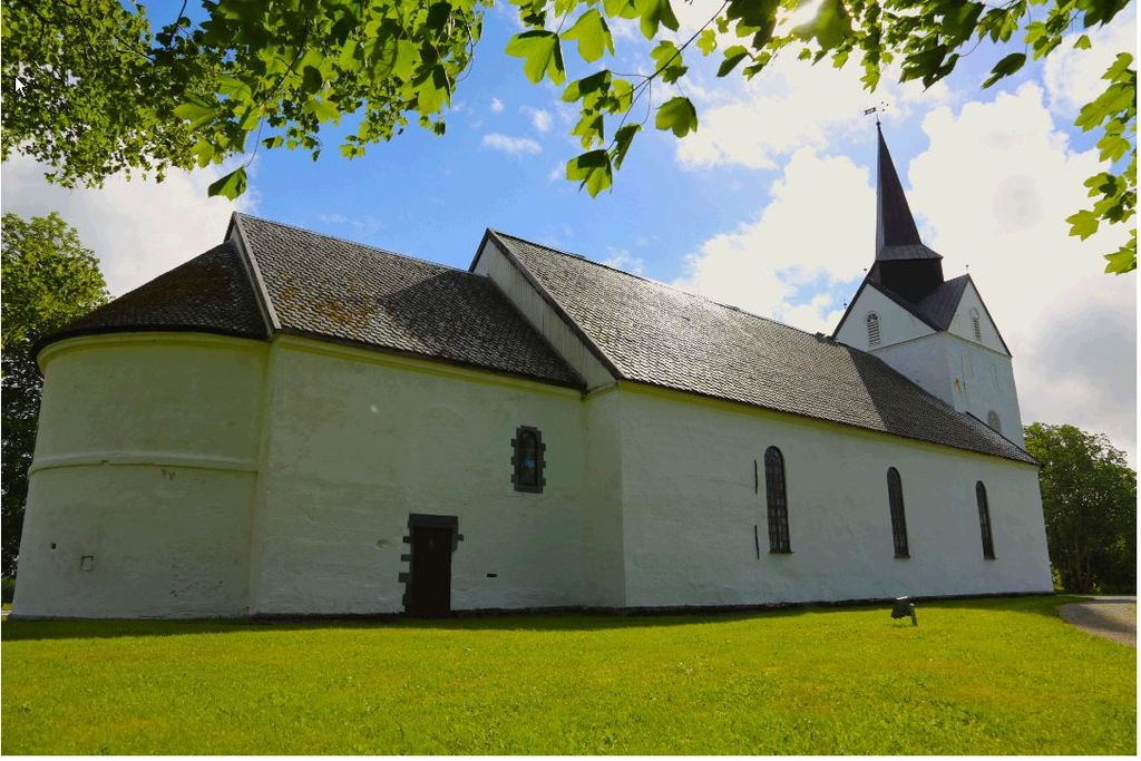 Foto fra 2014